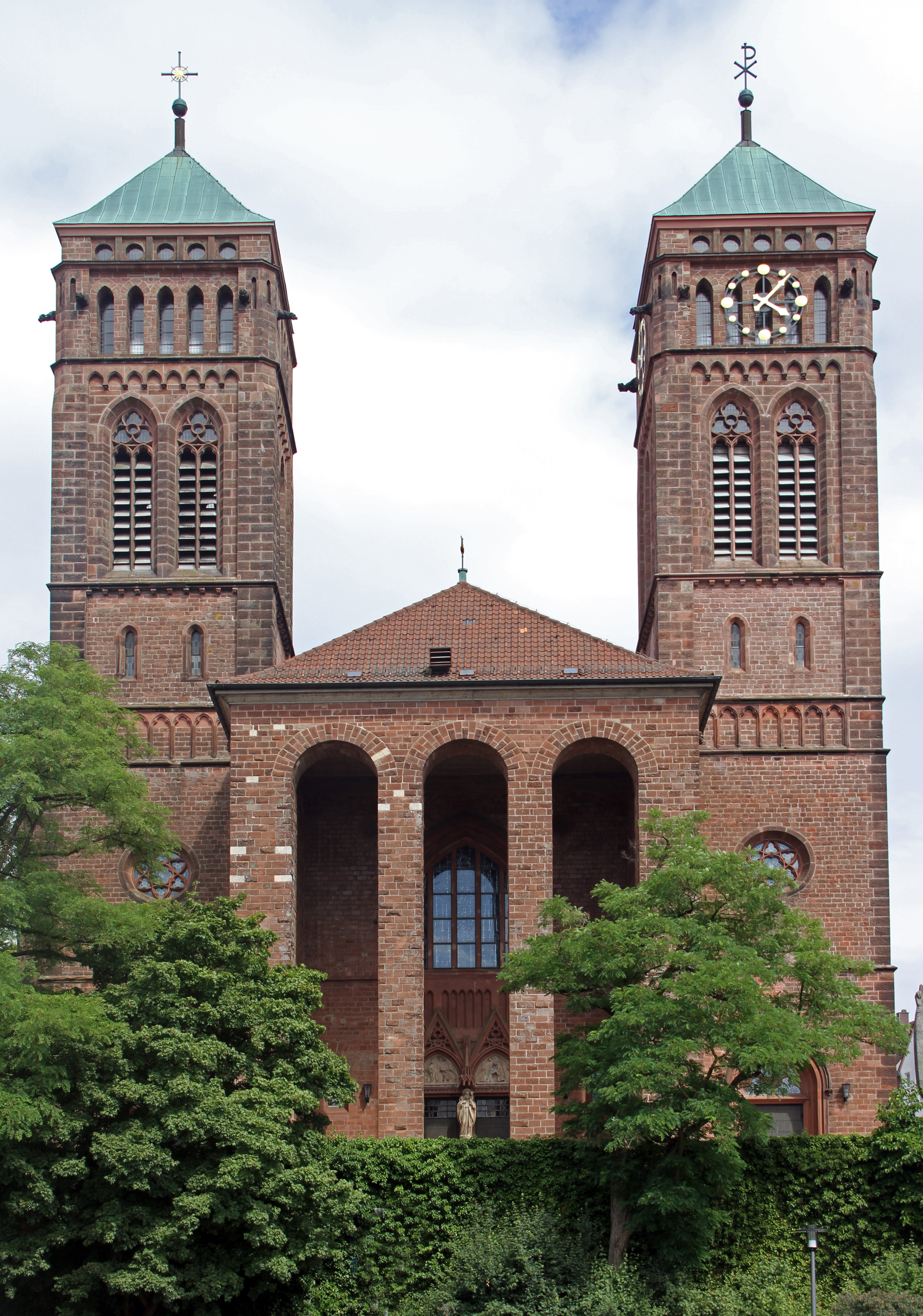 Katholische Pfarrkirche St. Pirminius in Pirmasens; neugotische Backsteinbasilika, 1897–1900, Architekt Wilhelm Schulte I., Neustadt an der Weinstraße, moderner Wiederaufbau durch Wilhelm Schulte II.